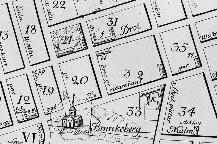 Del av Tillaeus karta 1733 kv Hägern större, Hägern mindre mm (norr är till höger) Nr f (31): Lidemanska palatset Nr g (21): Wredeska palatset